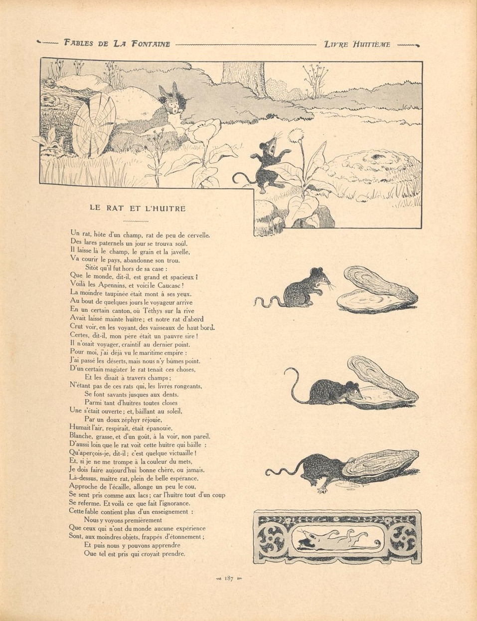 Fables de La Fontaine illustrées par Benjamin Rabier : Le rat et l'huître.